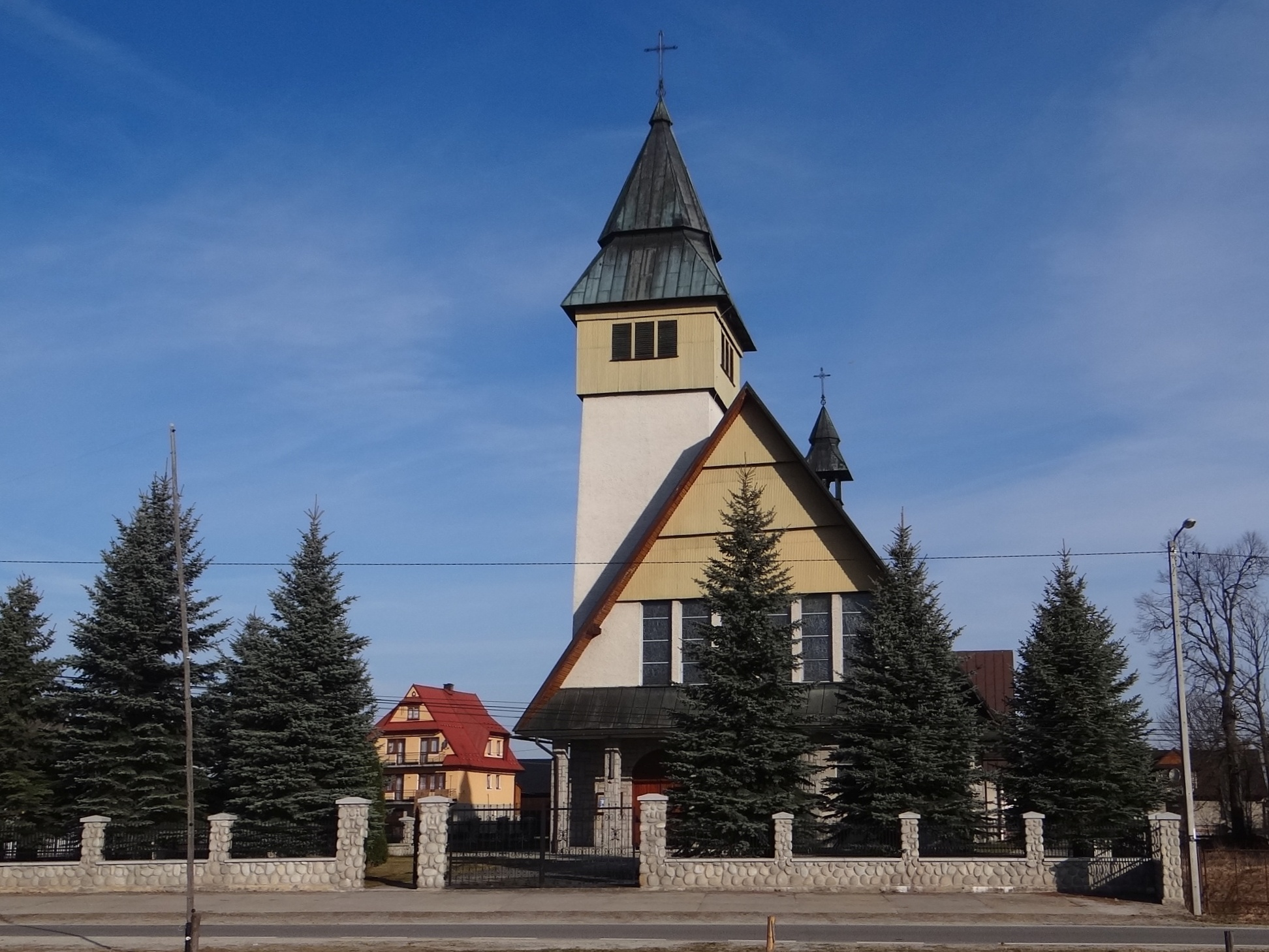 Kościół we Wróblówce